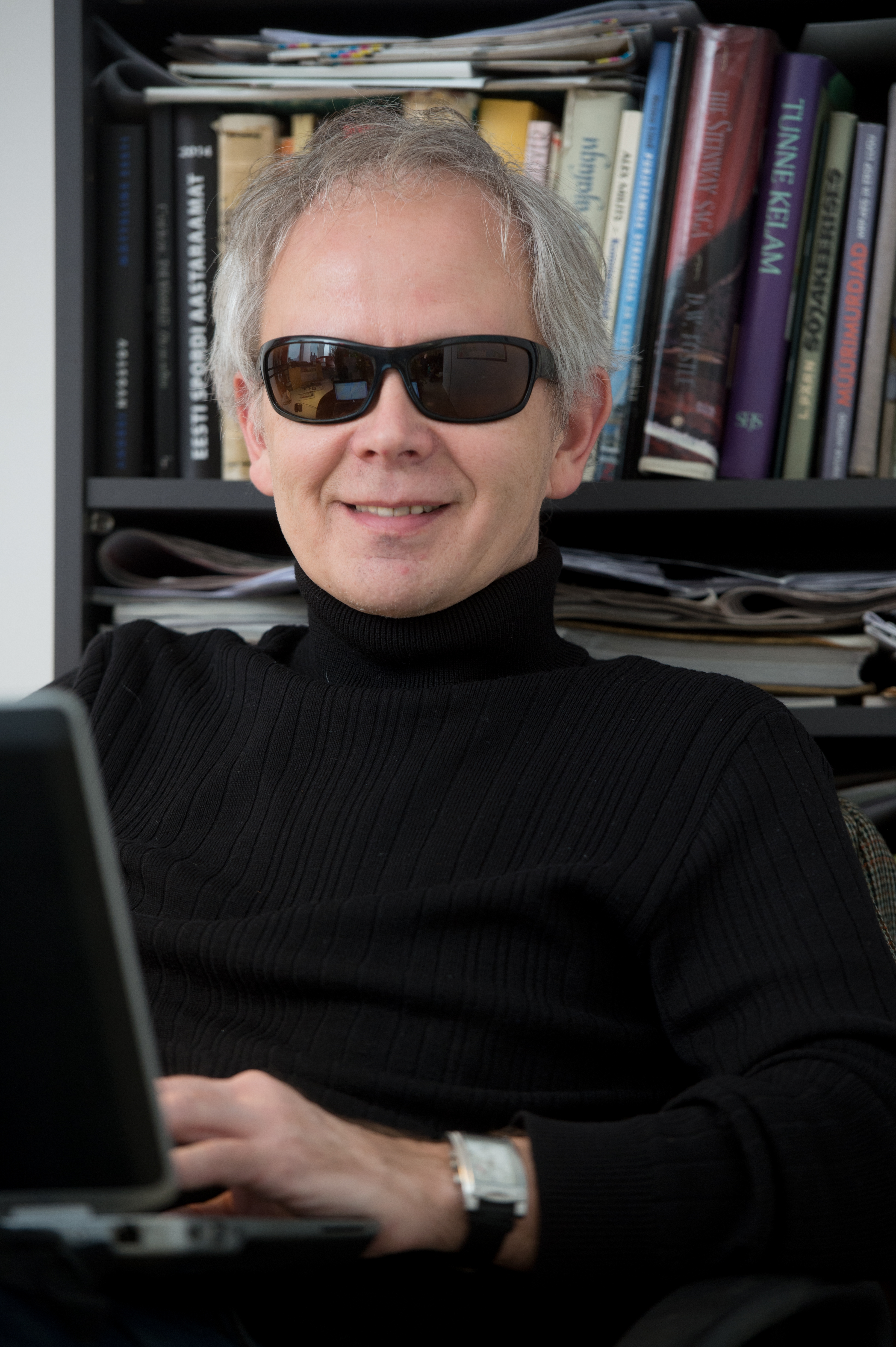 Madis Jürgen